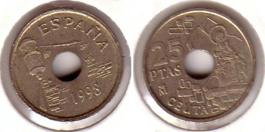 25 pesetas. Ceuta